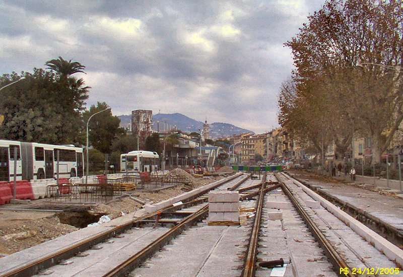 Le boulevard Jean-Jaurès durant les travaux du nouveau tramway. Vue en direction du nord.